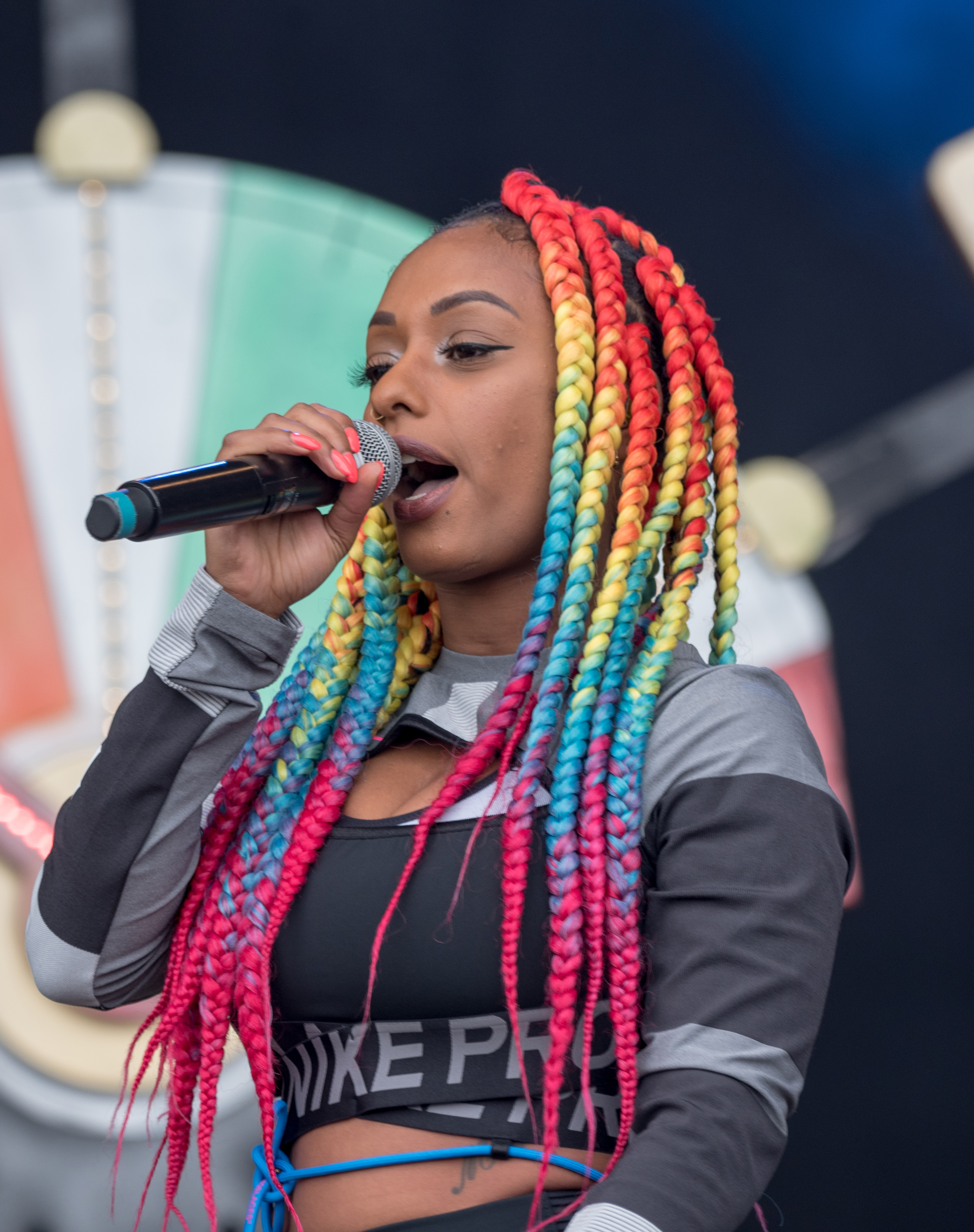 Nura live auf dem Openair Frauenfeld 2019